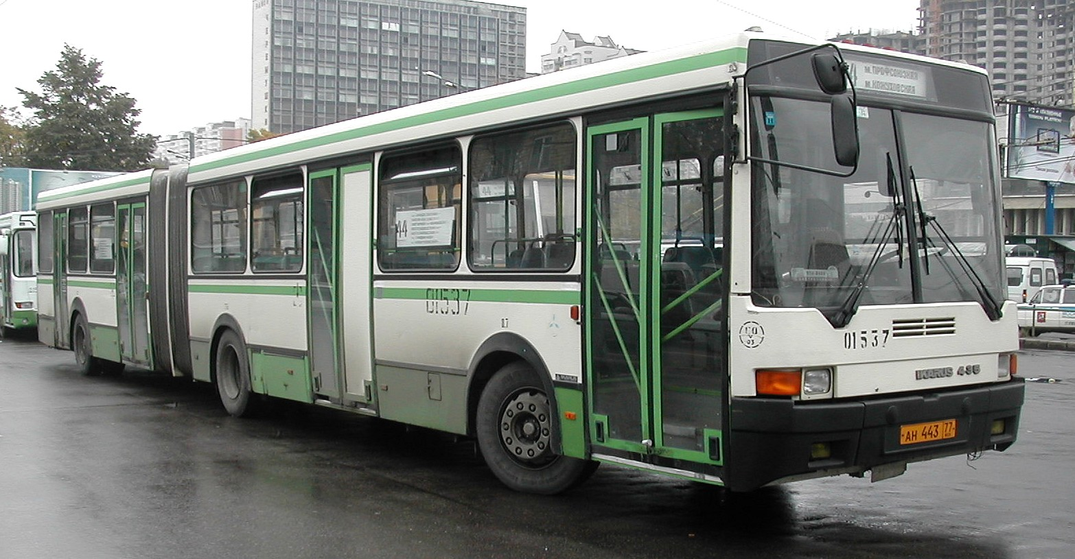 Ikarus 435 in Moscow. // Нахимовский проспект у метро "Профсоюзная". Справа видно еще не сгоревшее здание ИНИОН